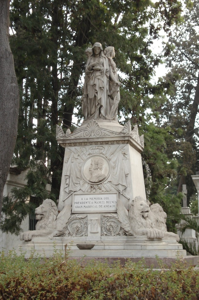 Tumba de Manuel Bulnes en el Cementerio General de Santiago de Chile.